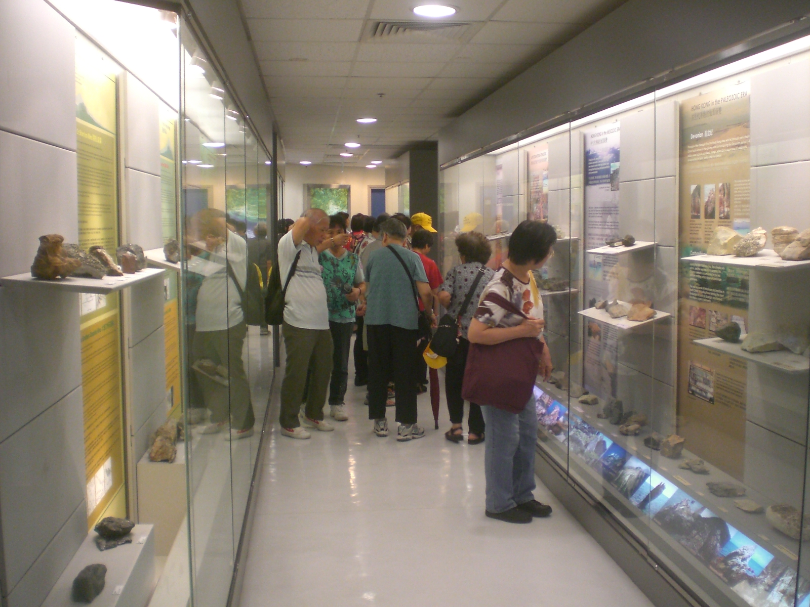 香港大學 厲樹雄科學館 香港大學許士芬地質博物館 內景